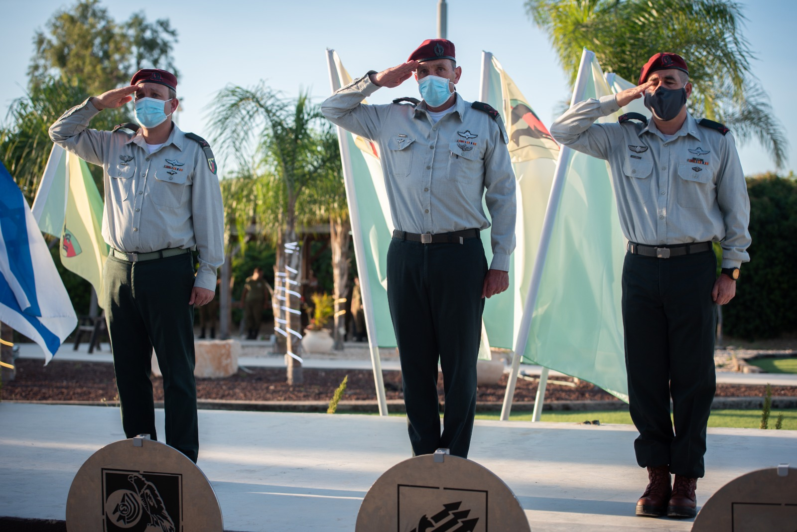 תא״ל נמרוד אלוני (בתמונה מימין) נכנס ב-2.8.2020 לתפקיד מפקד עוצבת ״שועלי האש״. טקס החילופים נערך במחנה ״רעים״, במעמד מפקד פיקוד הדרום, אלוף הרצי הלוי, מפקדים, לוחמים, בני משפחה, ראשי הרשויות באזור ומוזמנים נוספים. תא״ל נמרוד אלוני החליף את תא״ל אליעזר טולדנו (בתמונה משמאל), שפיקד על עוצבת "שועלי האש" בשנתיים האחרונות.